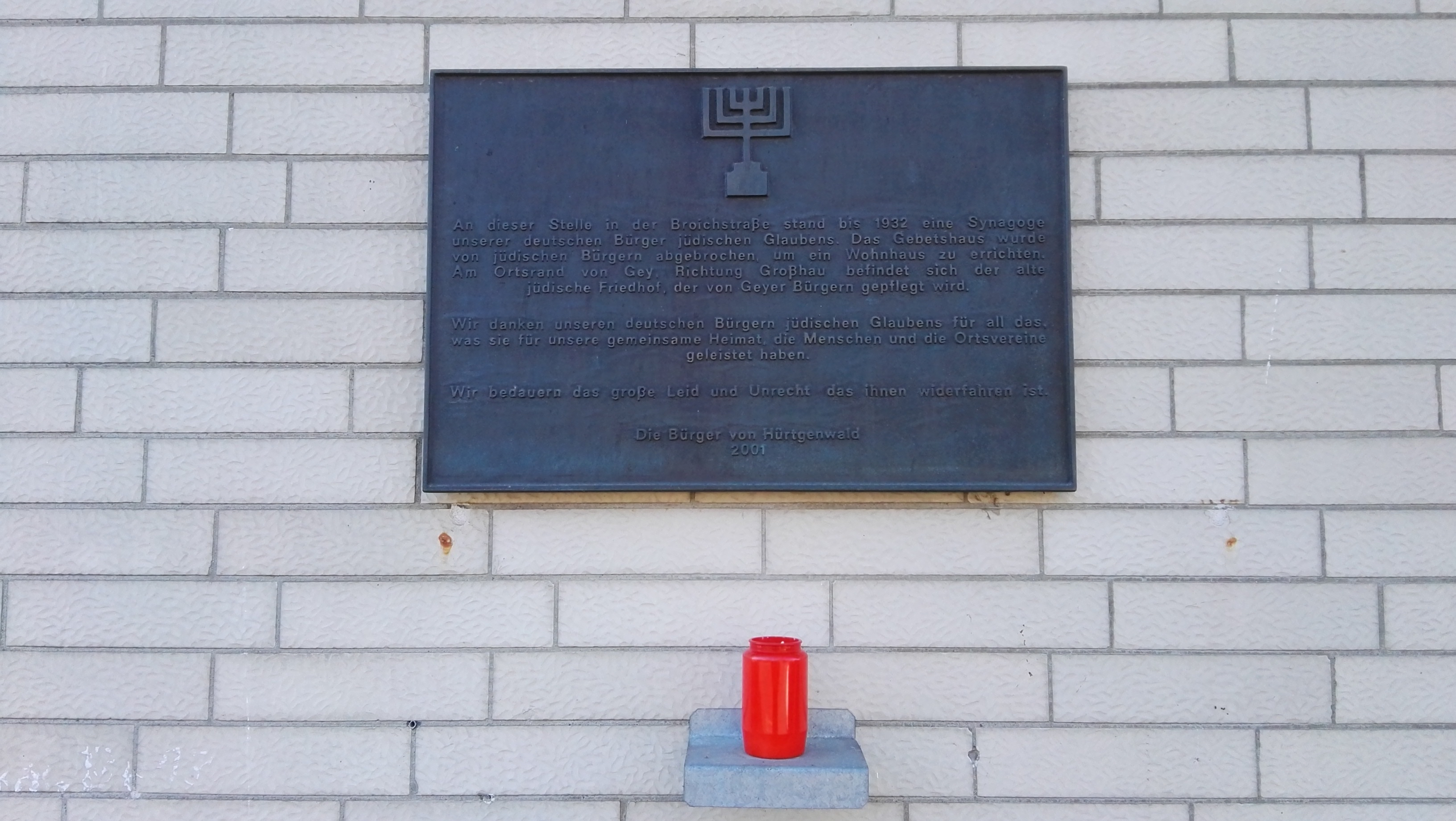 Gedenktafel_Synagoge_Gey_Broichstrasse_5_Huertgenwald.jpg